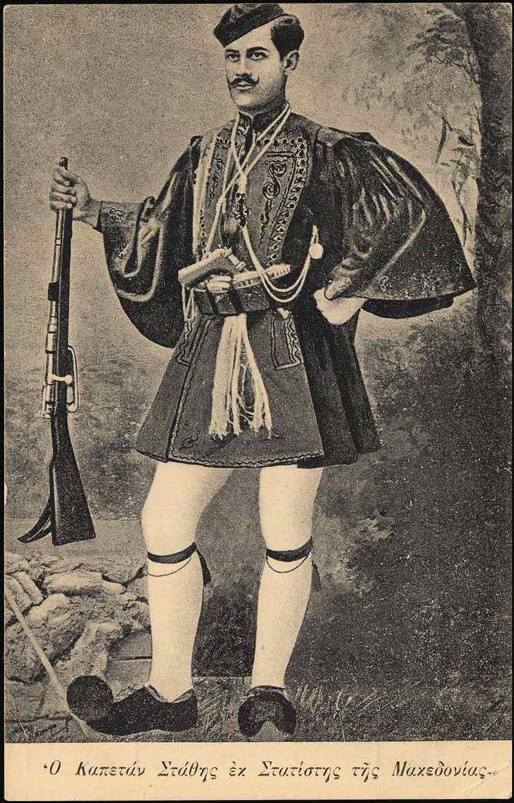 Евангелос Статис.